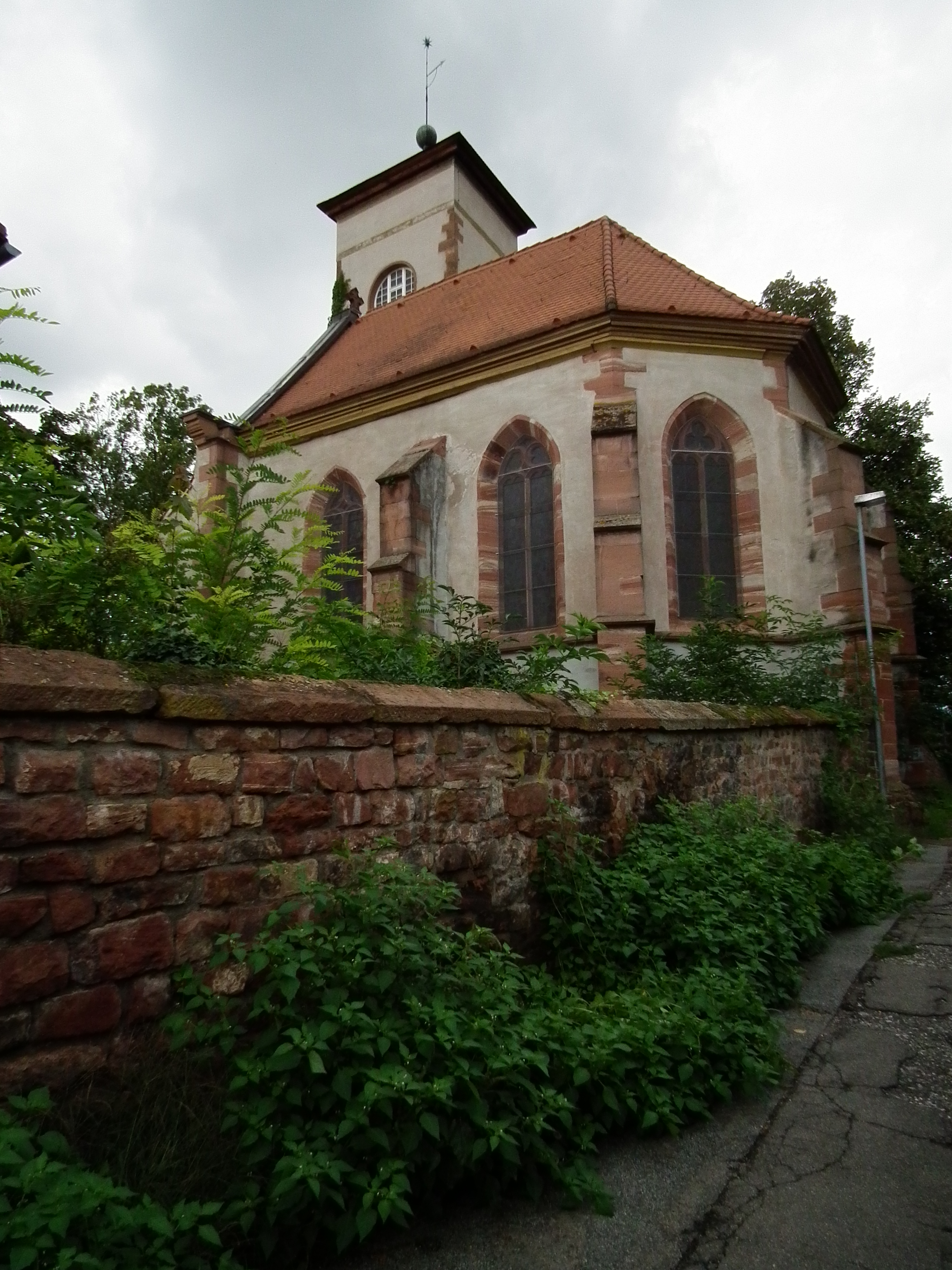 Kapelle auf dem Gelände der Elisabeth-von-Thadden-Schule im Heidelberger Stadtteil Wieblingen (Baden-Württemberg, Deutschland)